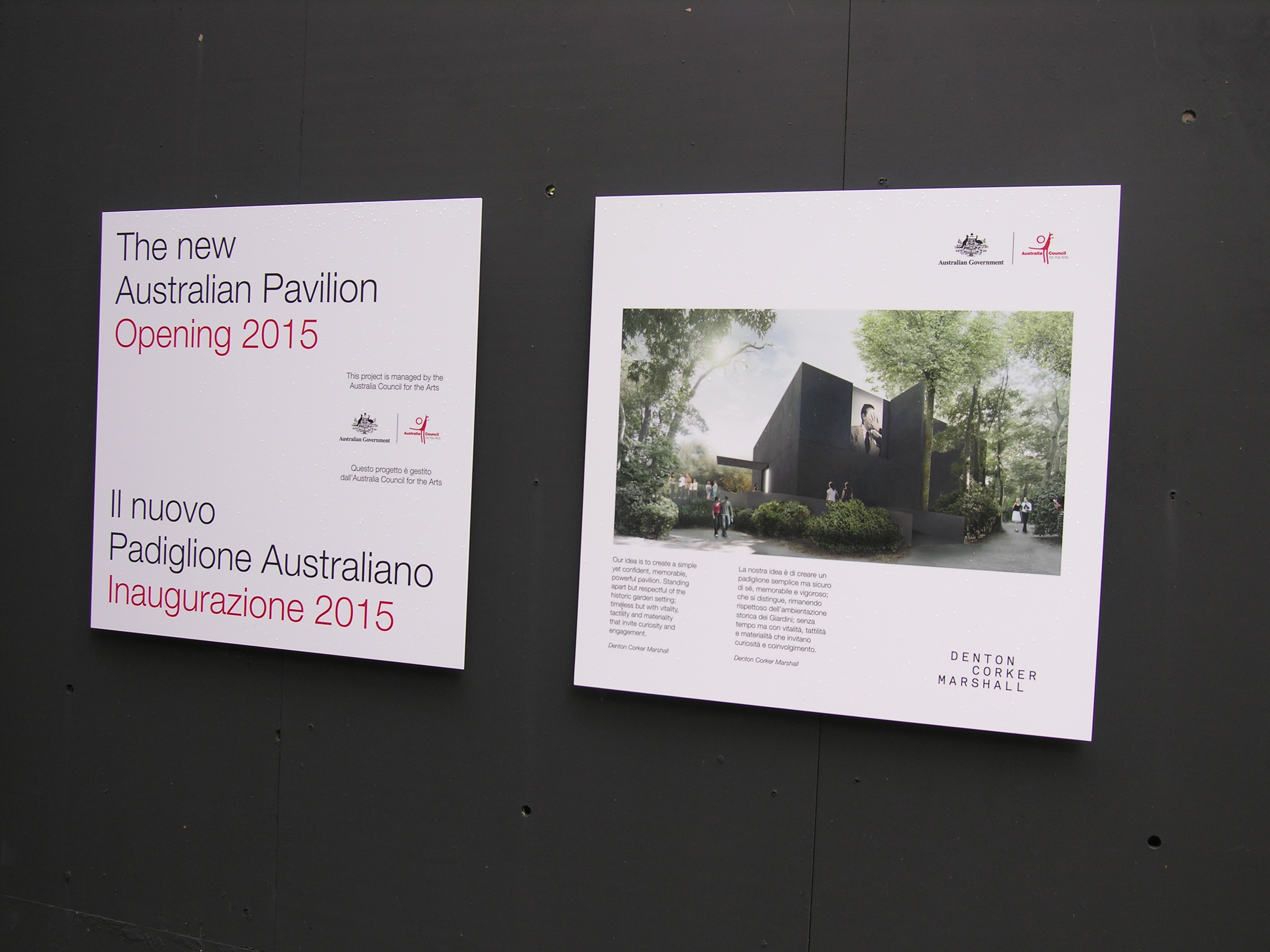 Castello, 30100 Venezia, Italy